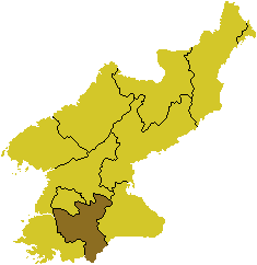 Map of Hwanghaebuk-to, DPRK, 2006